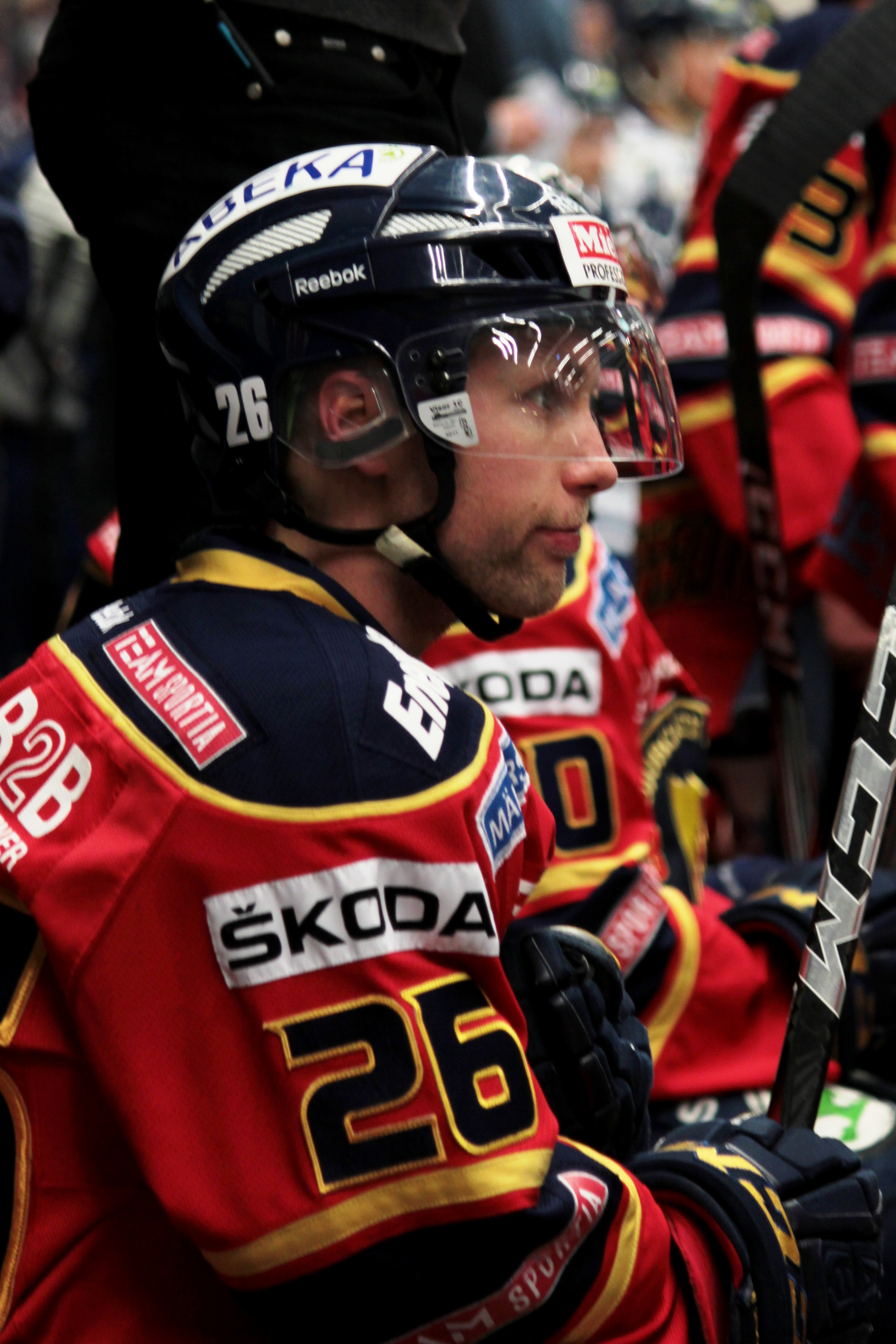 Tim Eriksson i kvalmatchen mellan Leksands IF och Djurgårdens IF i Leksand 2012-03-31